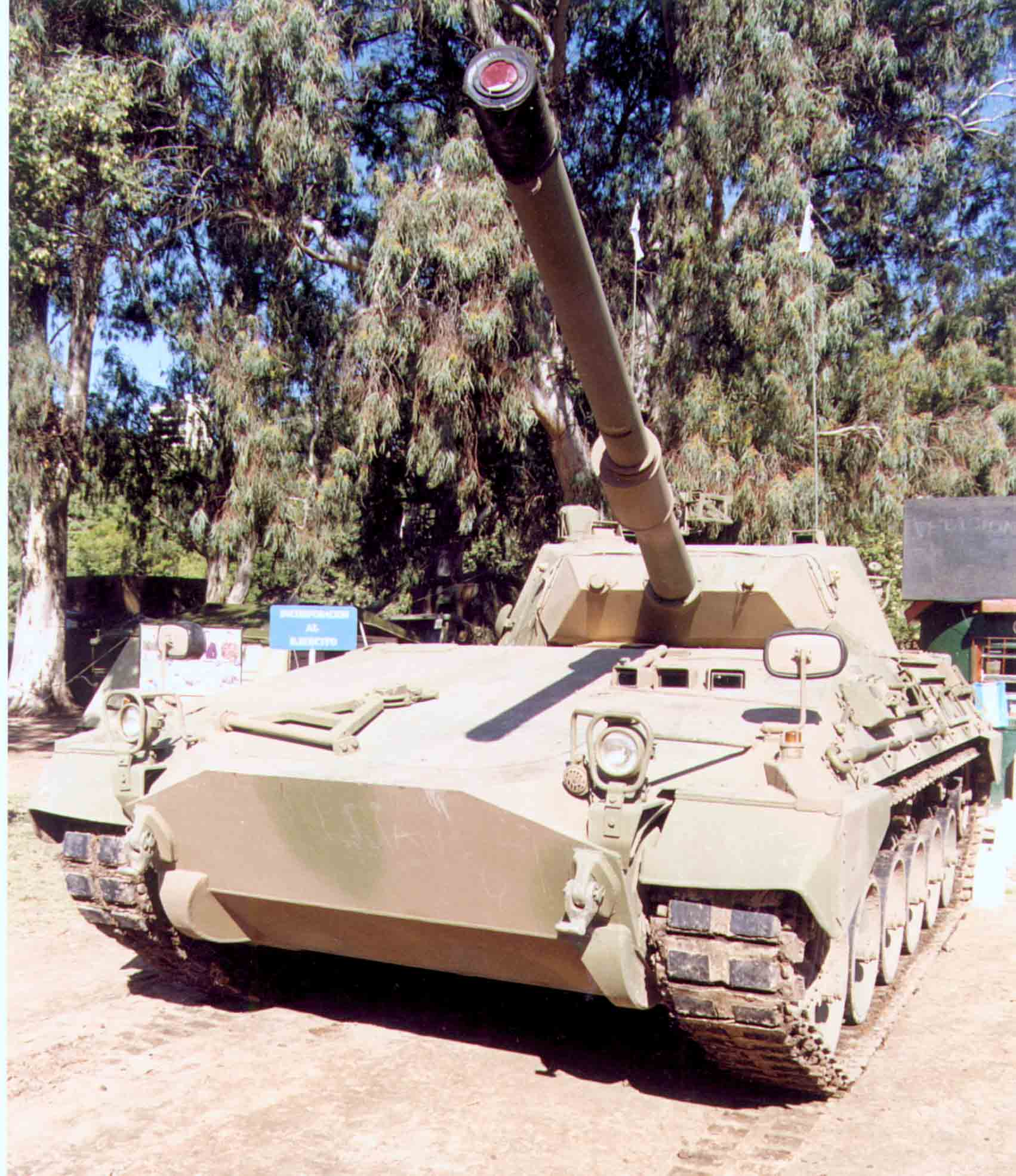 Tanque de la II Brigada de Caballeria Blindada. Foto tomada en el parque Urquiza en Paraná, Entre Ríos